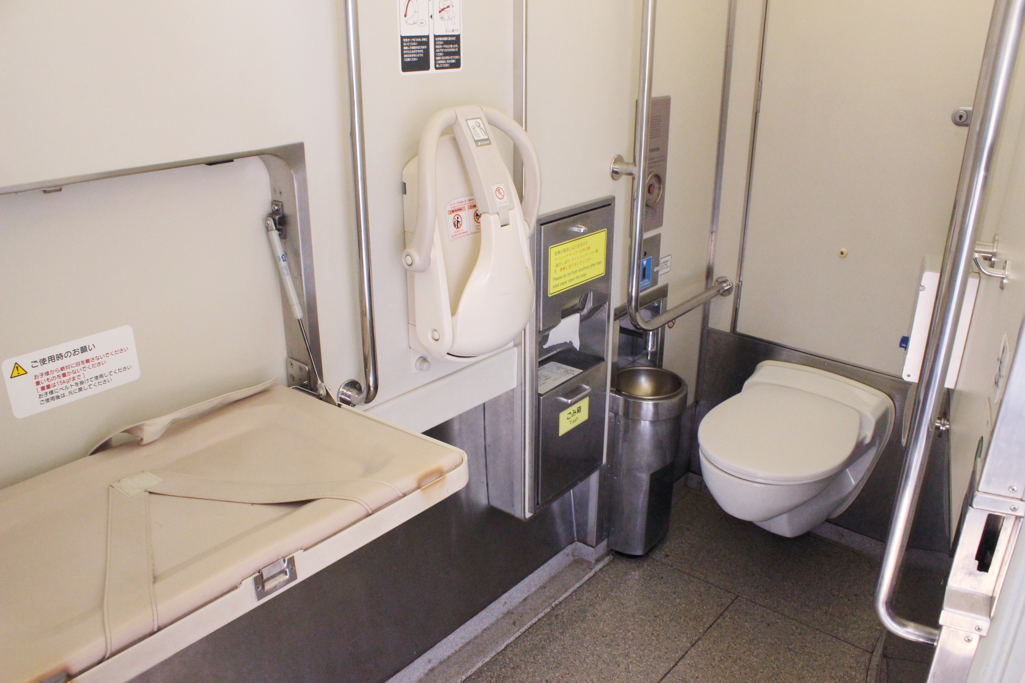 21020系多目的型トイレ